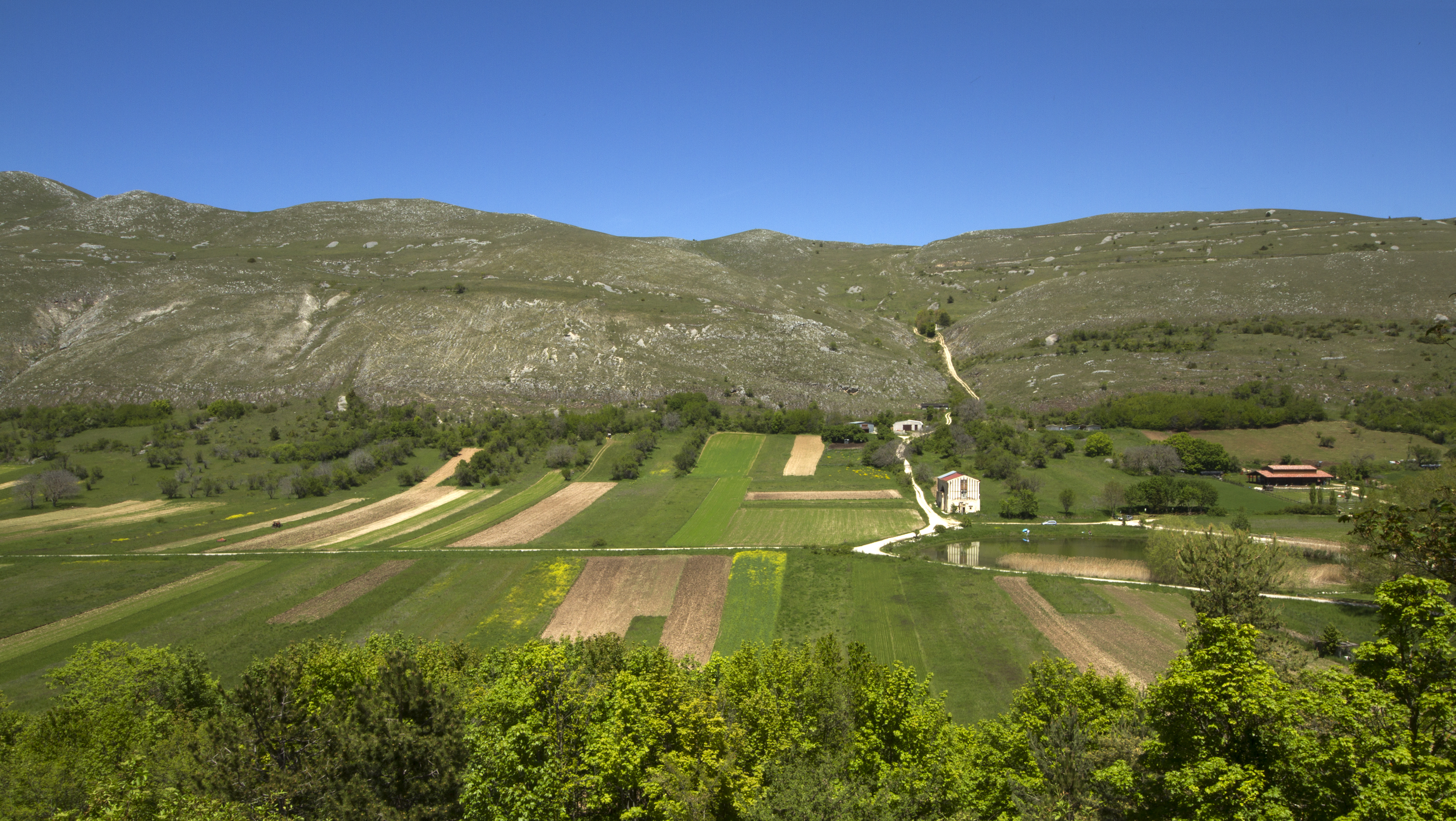 67020 Santo Stefano di Sessanio AQ, Italy